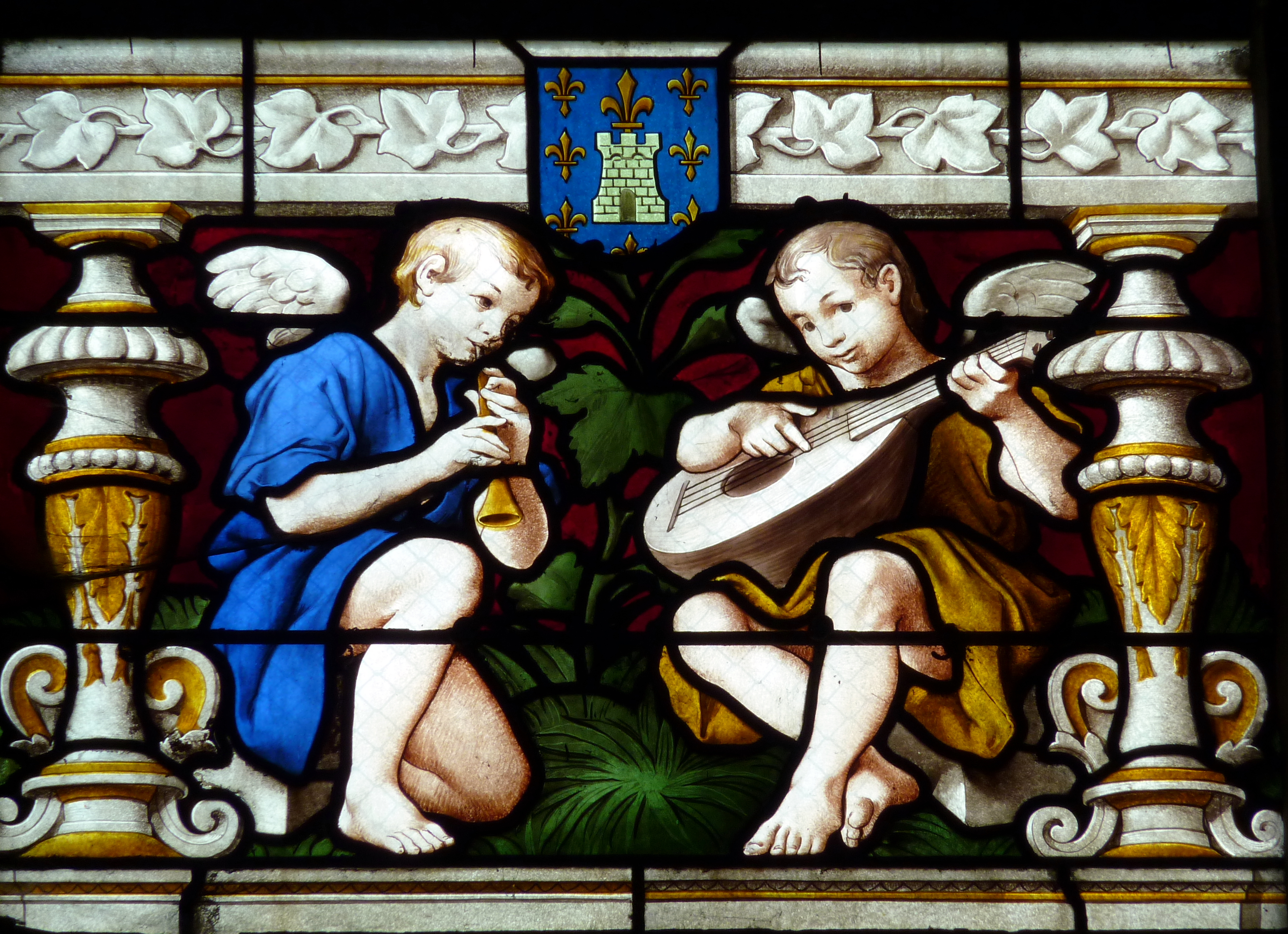 Ausschnitt des Bleiglasfensters Nr. 16 (19. Jahrhundert) in der katholischen Pfarrkirche Saint-Martin (Collégiale Saint-Martin) in Montmorency, Darstellung: musizierende Engel (siehe: Dominique Foussard, Charles Huet, Mathieu Lours: Églises du Val-d'Oise. Pays de France, Vallée de Montmorency, Société d'Histoire et d'Archéologie de Gonesse et du Pays de France, 2. Auflage, Gonesse 2011, ISBN 9782953155426)